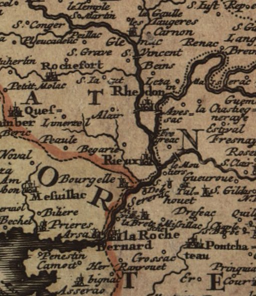 Extrait de la Tabula ducatus britanniae gallis. Le gouvernement général de Bretagne in suos novem episcopatus omnes Turonensi Aurel. Extrait centré sur la ville de Redon.